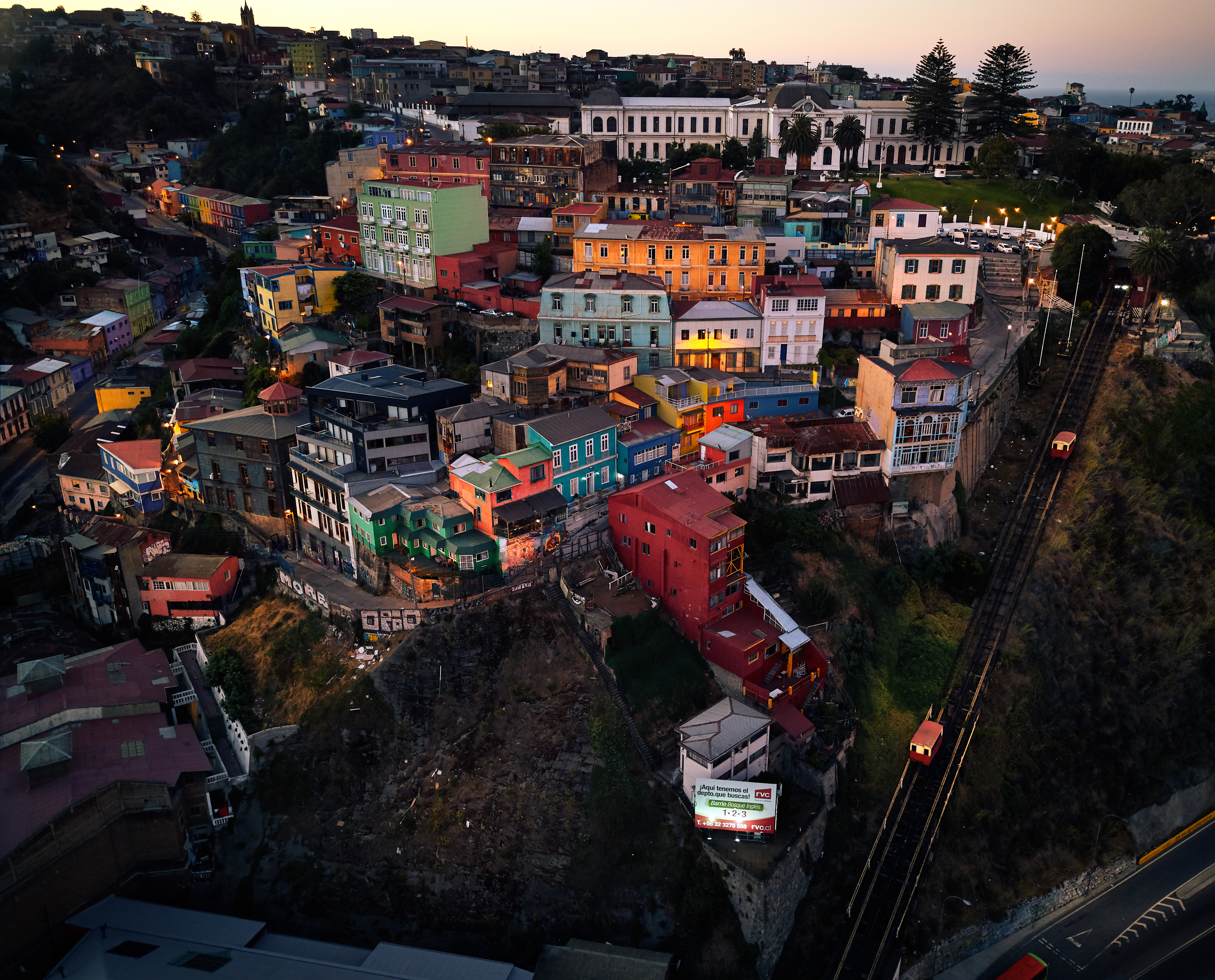 Cerro Artilleria, Valparaíso